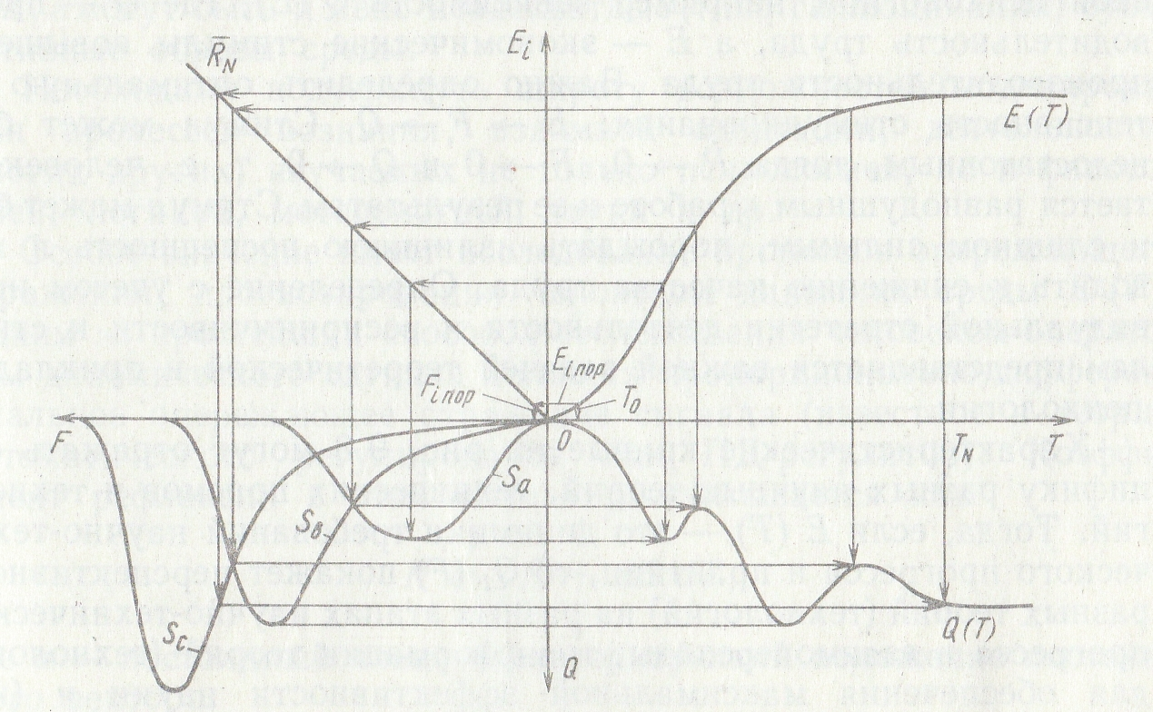 Пример построения динамики процесса взаимной адаптации системы и среды на квадриграмме